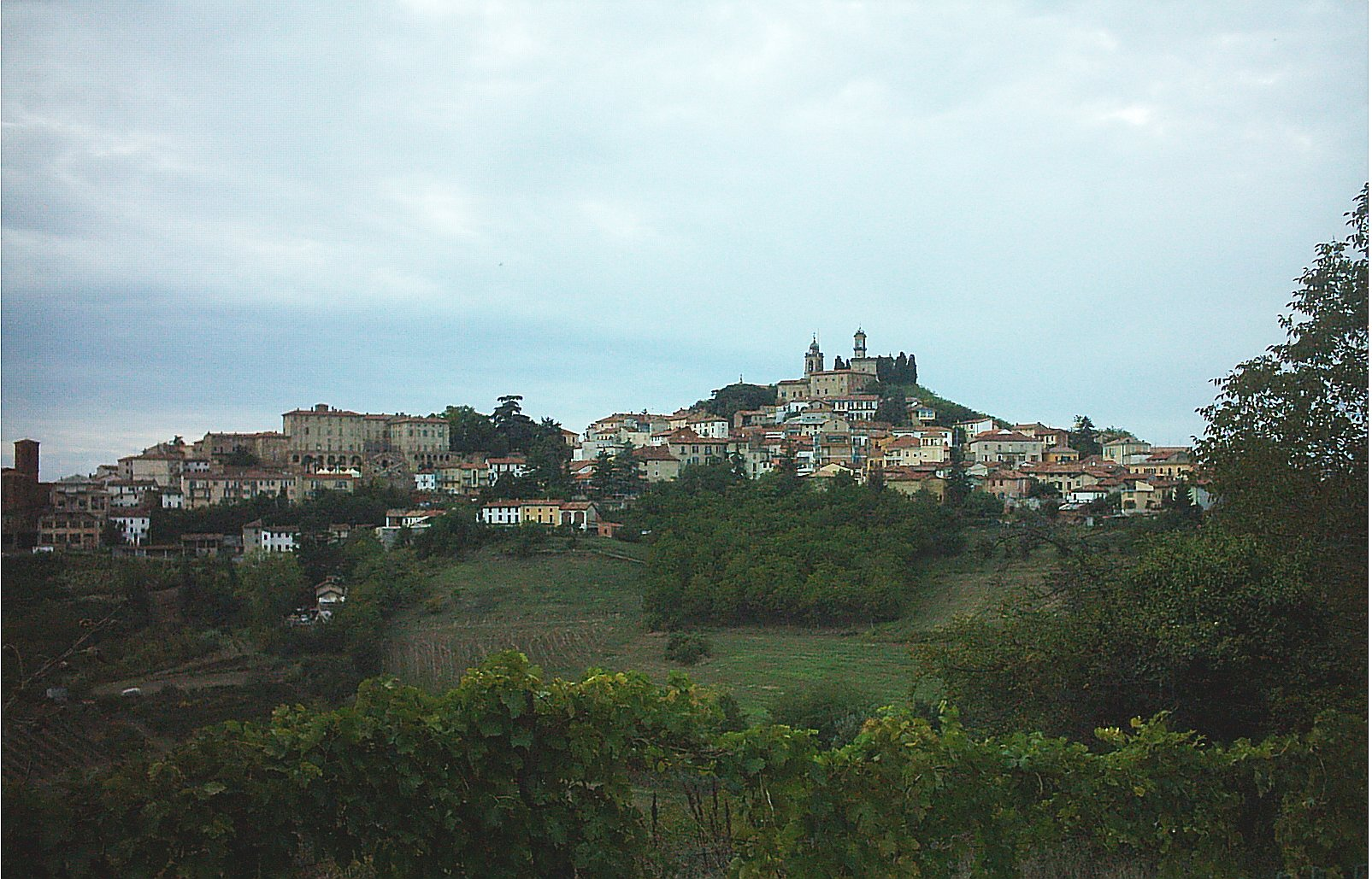 Vignale Monferrato, Piemonte, Italy